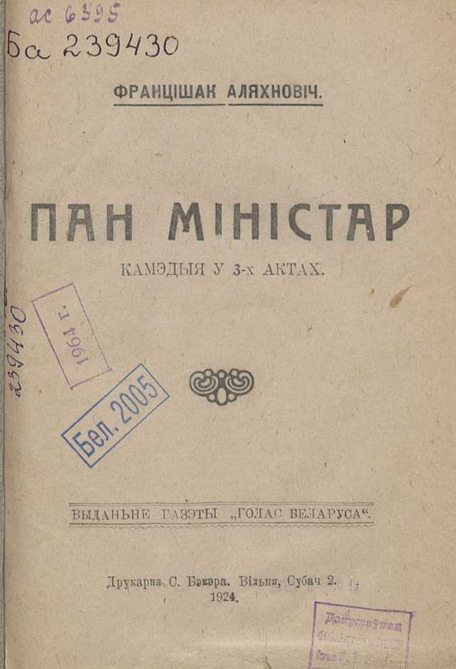 Беларуская (тарашкевіца): Вокладка выданьня п'есы Ф. Аляхновіча "Пан міністар", выданьне газэты «Голас беларуса», 1924 (Друкарня С. Бэкэра)